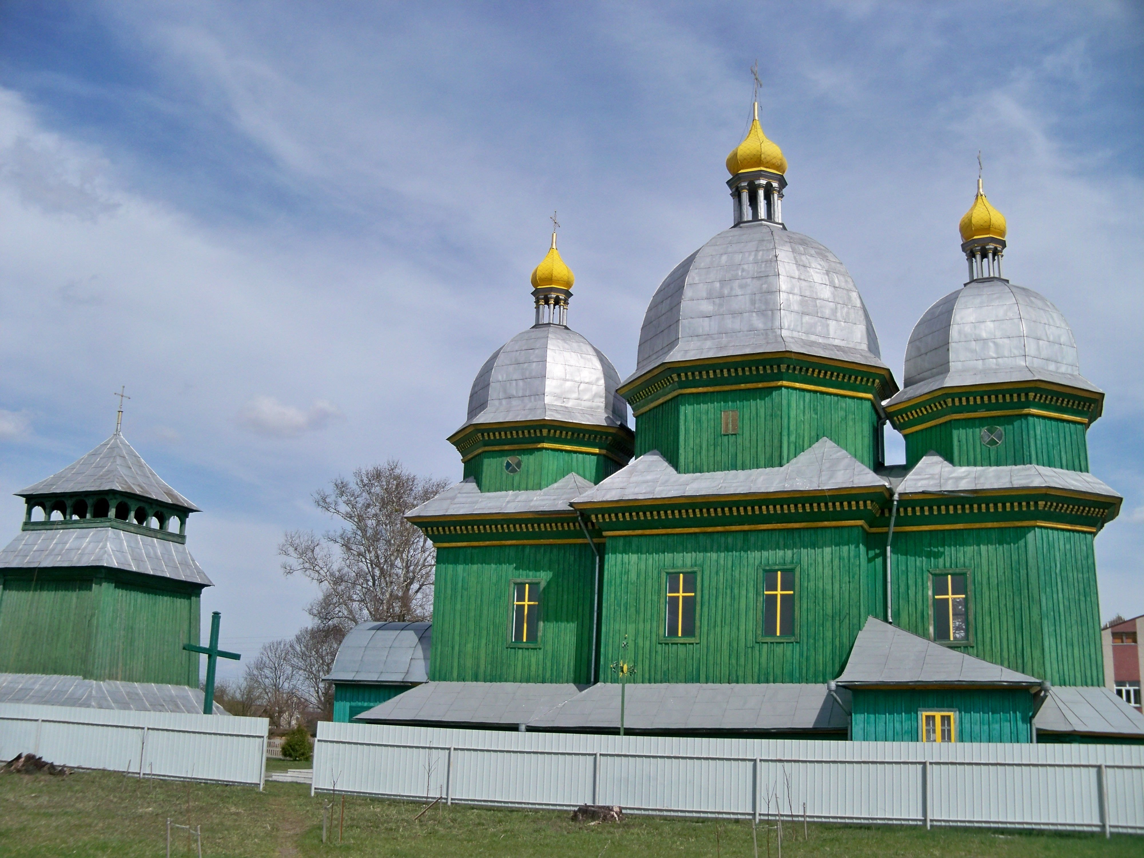 Церква Св.Духа (дер.), с.Полове